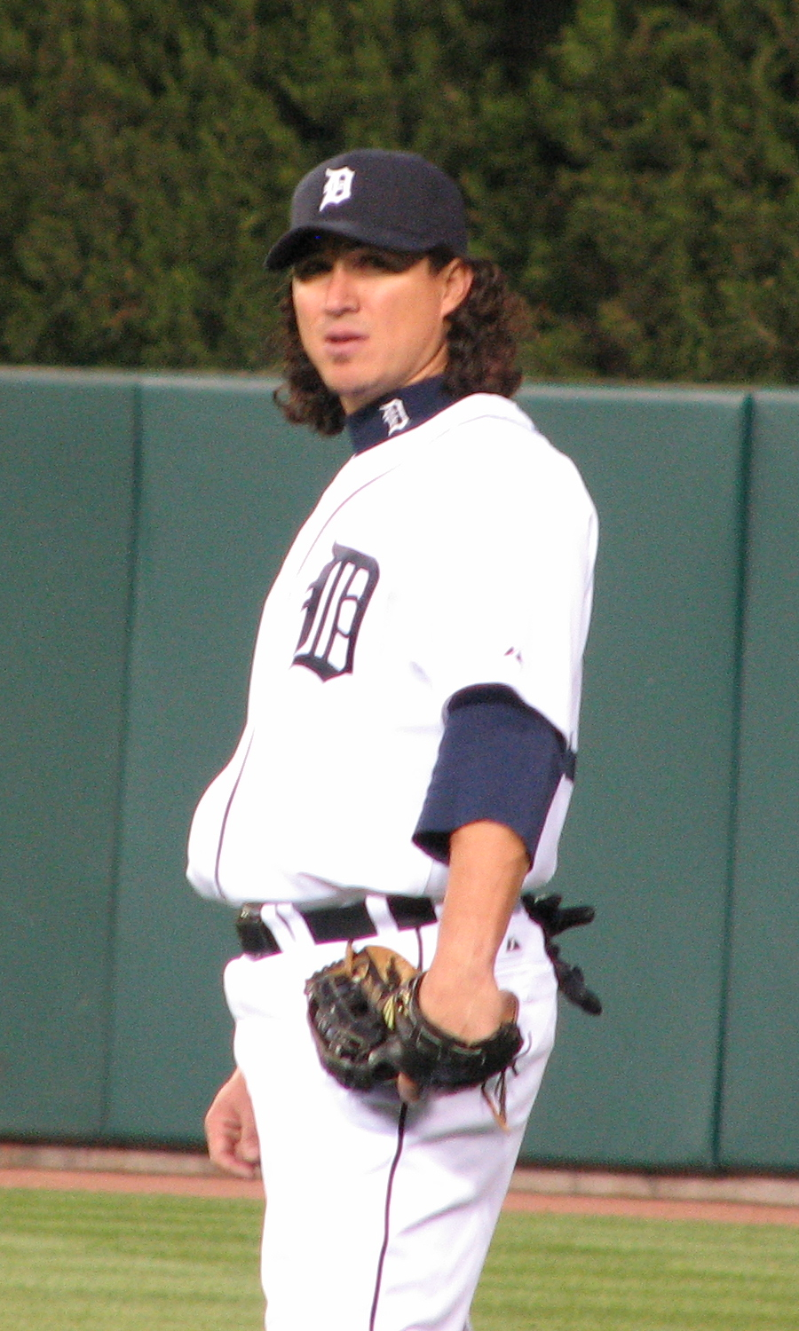 Magglio Ordóñez